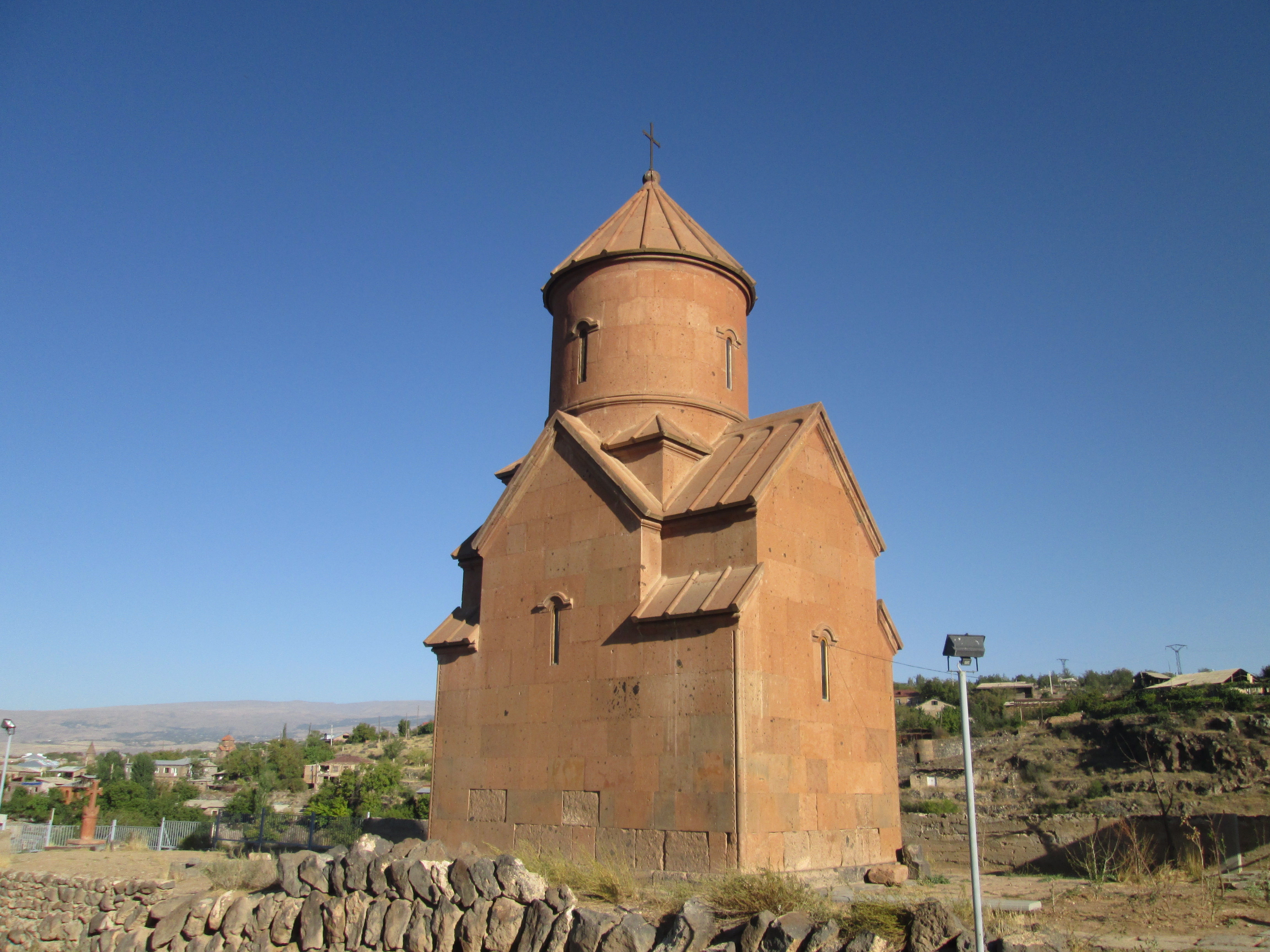 Աշտարակի Սուրբ Սարգիս եկեղեցի 1/18